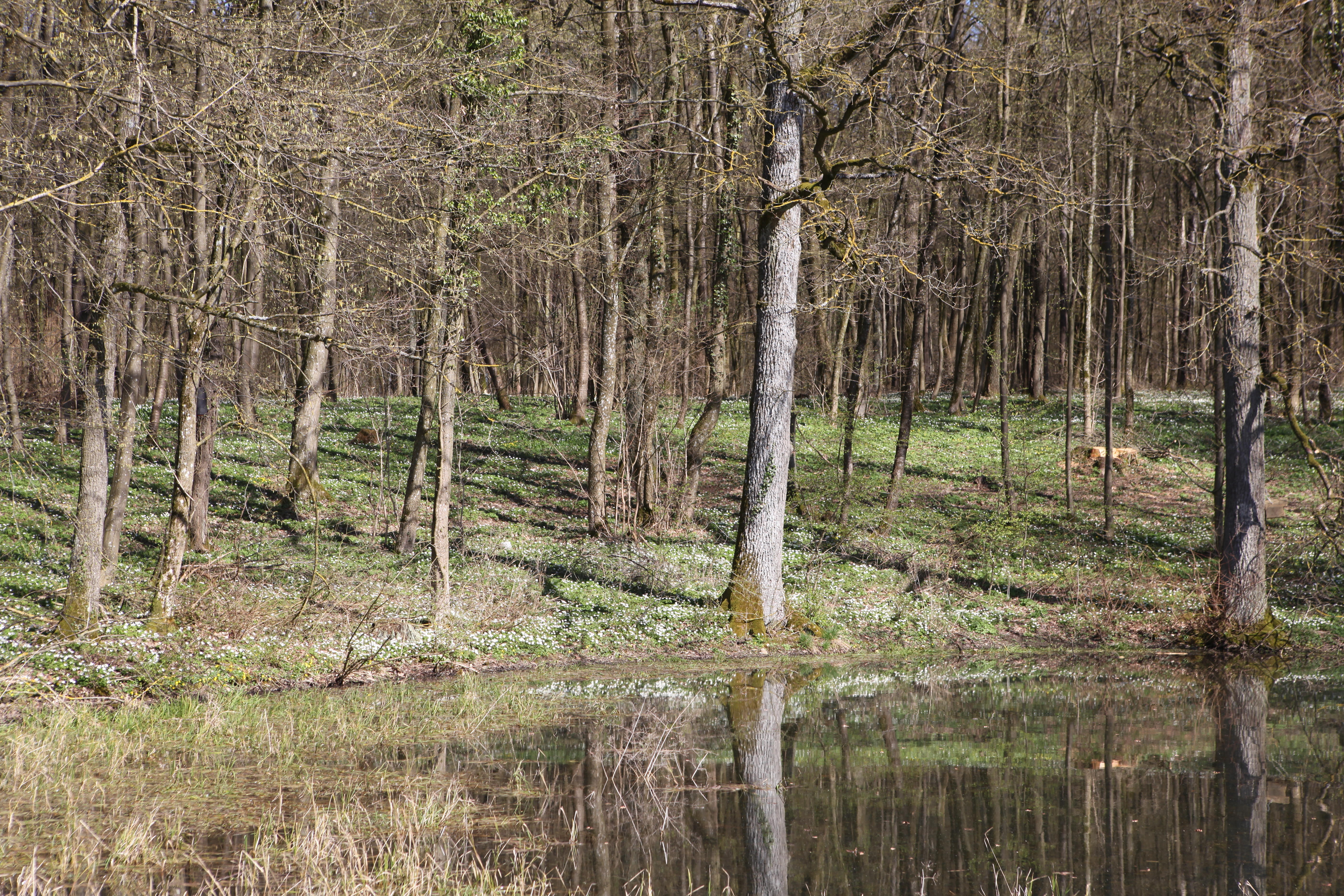 Naturschutzgebiet „Laubmischwald bei Ahlstadt“ mit Frühlingsgeophyten